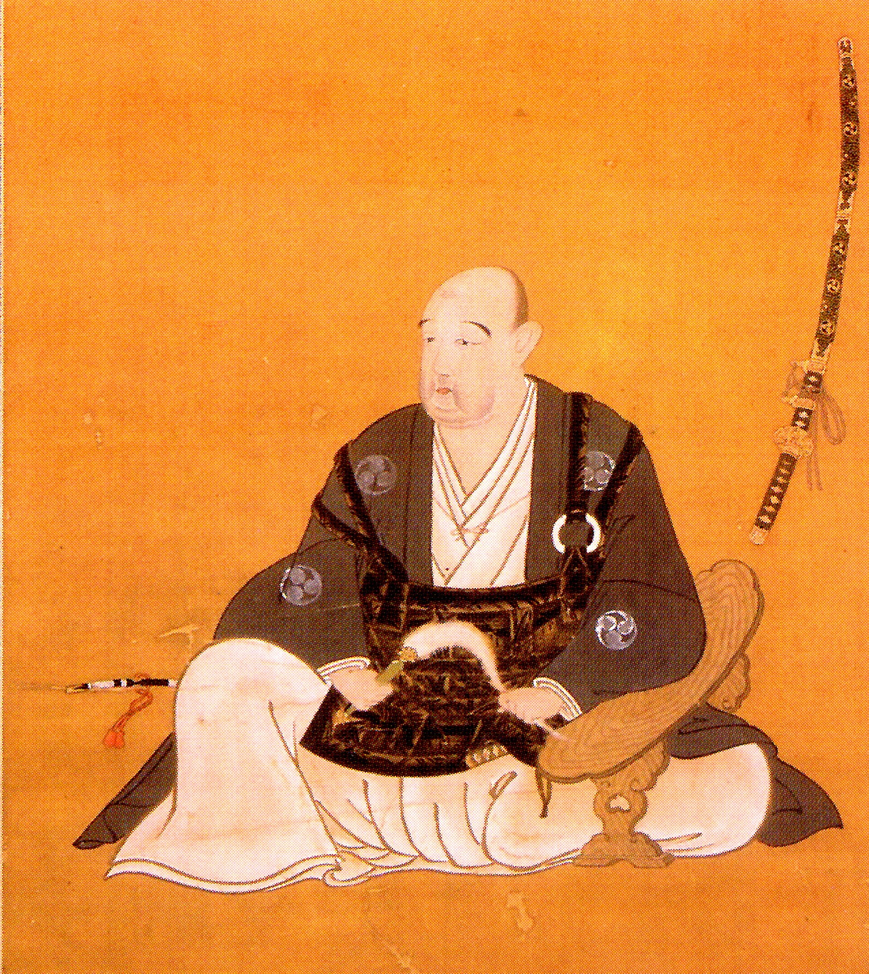 岡部長著の肖像。